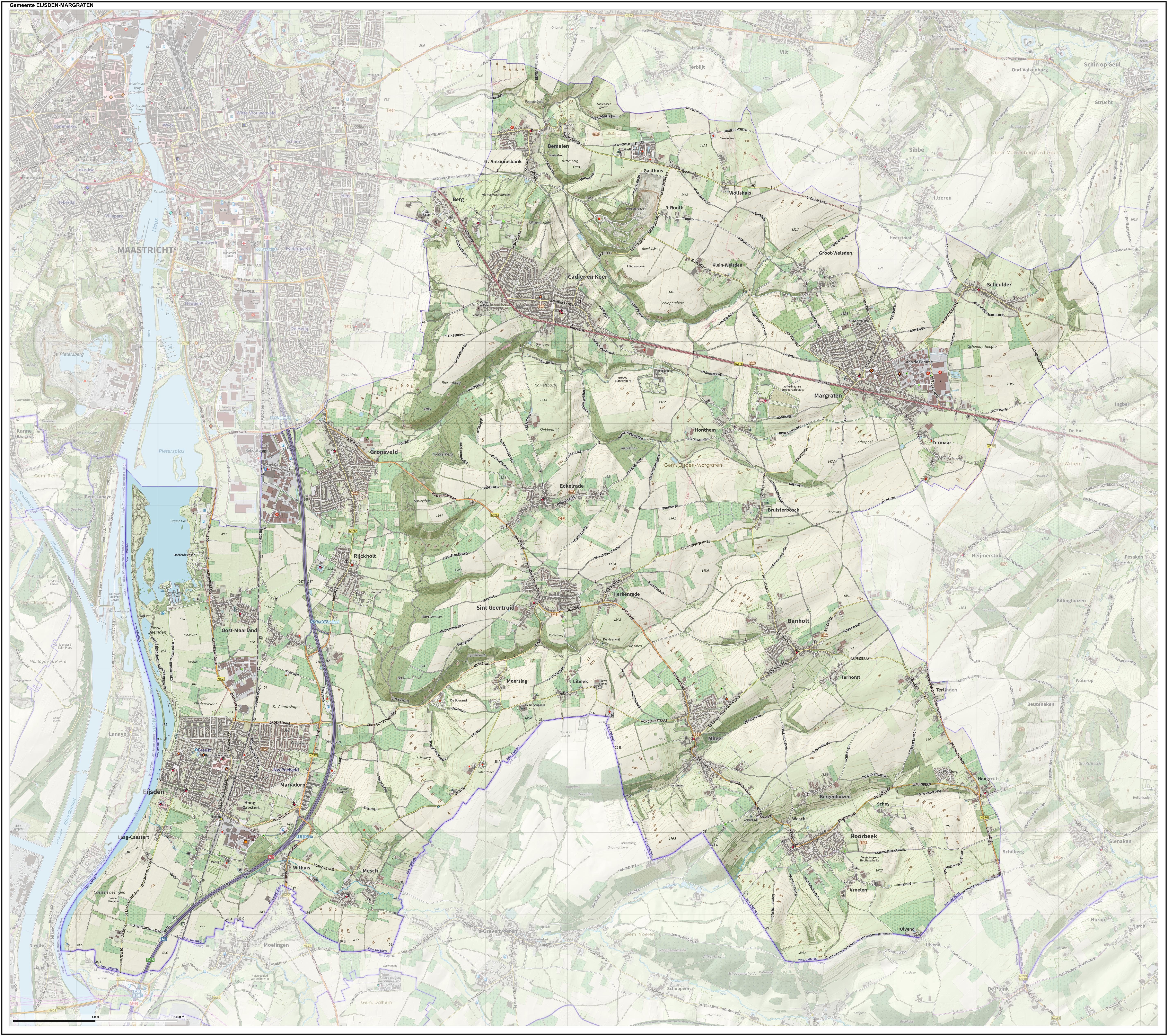 Topografische gemeentekaart. Resolutie: 400 pixels/km. Kaartbeeld samengesteld uit de open geodata van de Top10NL en Top25namen (Kadaster), Creative Commons-BY licentie. Gebouwvlakken uit open geodata BAG extract. Wegen uit de OpenStreetMap, OpenStreetMap community. Reliëfschaduw uit de Actuele Hoogtekaart AHN2. Samenstelling en kleurenschema: Jan-Willem van Aalst, met QGIS. Zie ook de Legenda.